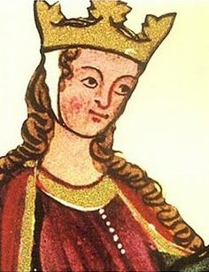 Eleonora van Aquitanië